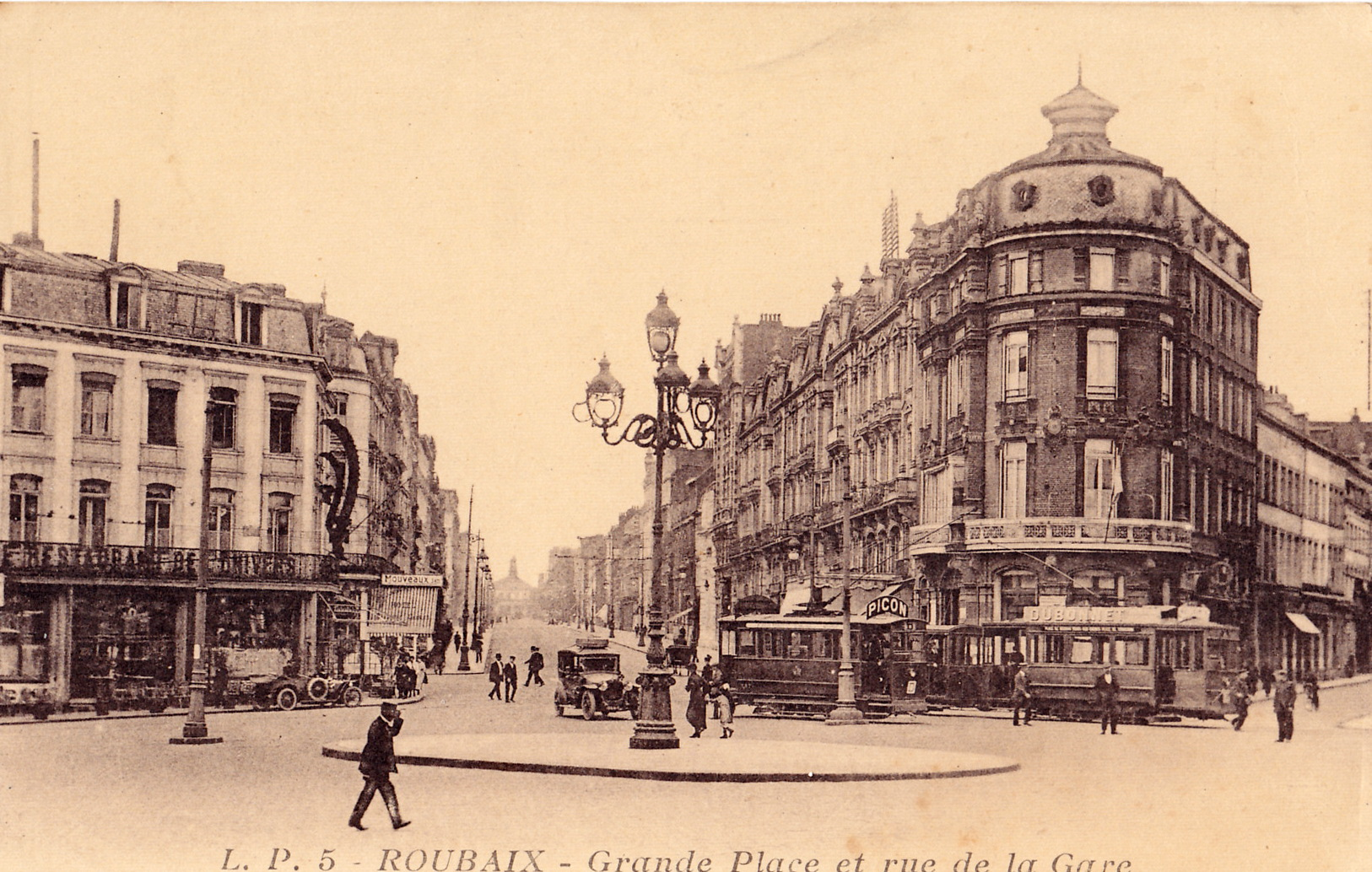 Carte postale ancienne éditée par L. P., n°5 :ROUBAIX - Grande Place et rue de la Gare